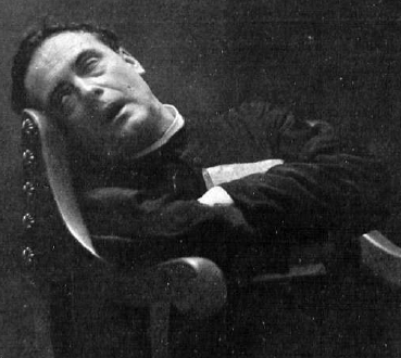 Detalle de una fotografía del actor español Enrique Borrás publicada en 1913 que refleja su interpretación en la obra teatral El místico